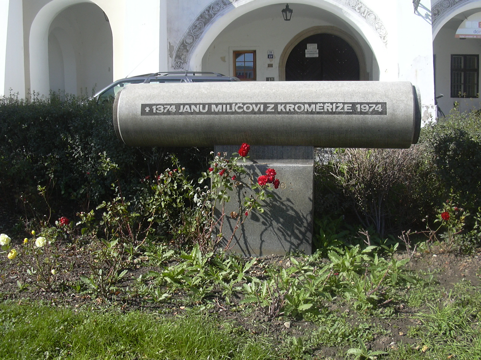 Jan Milíč z Kroměříže památník u muzea v Kroměříži